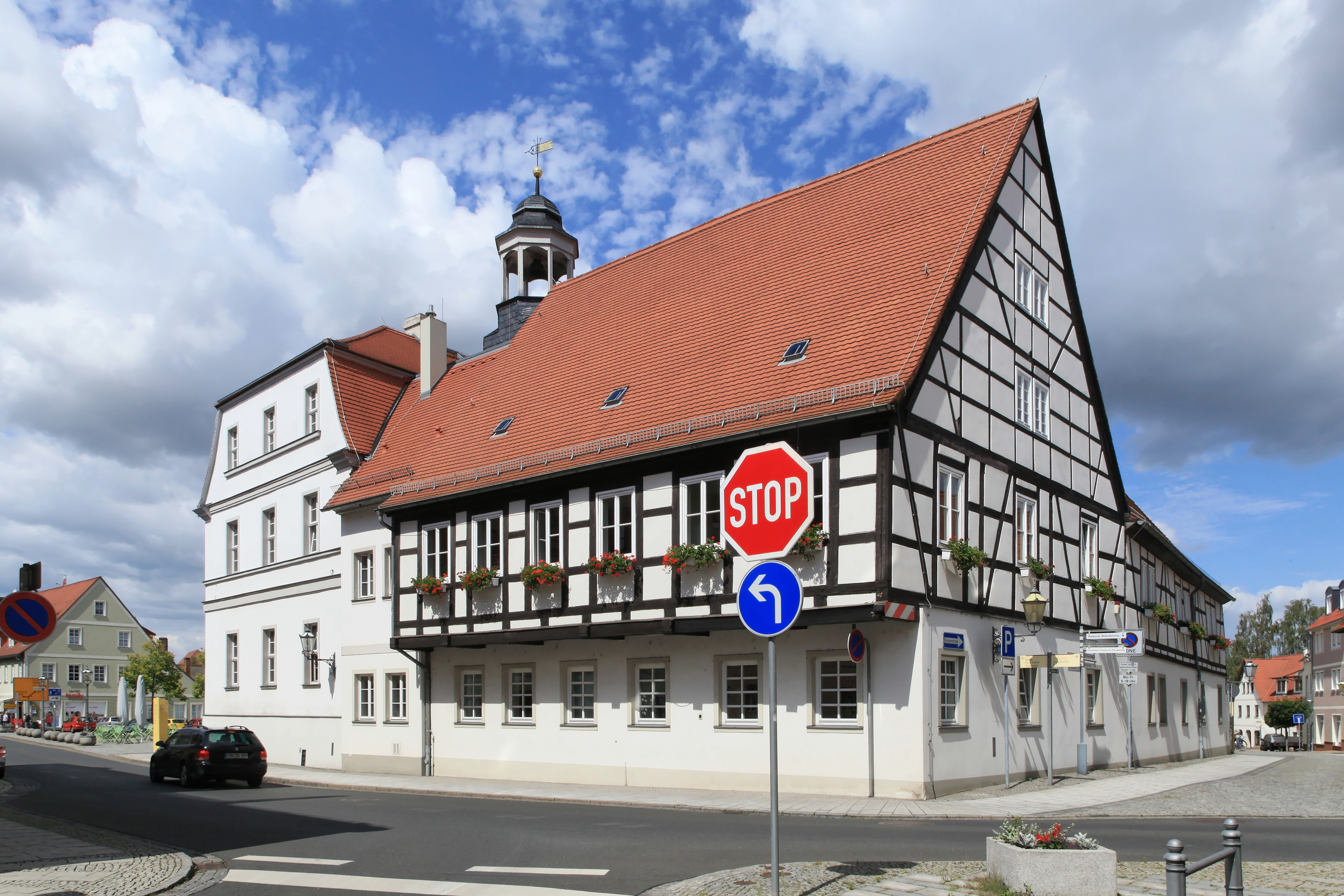 Rathaus an der Ecke Markt / Kirchstraße in Bad Düben)